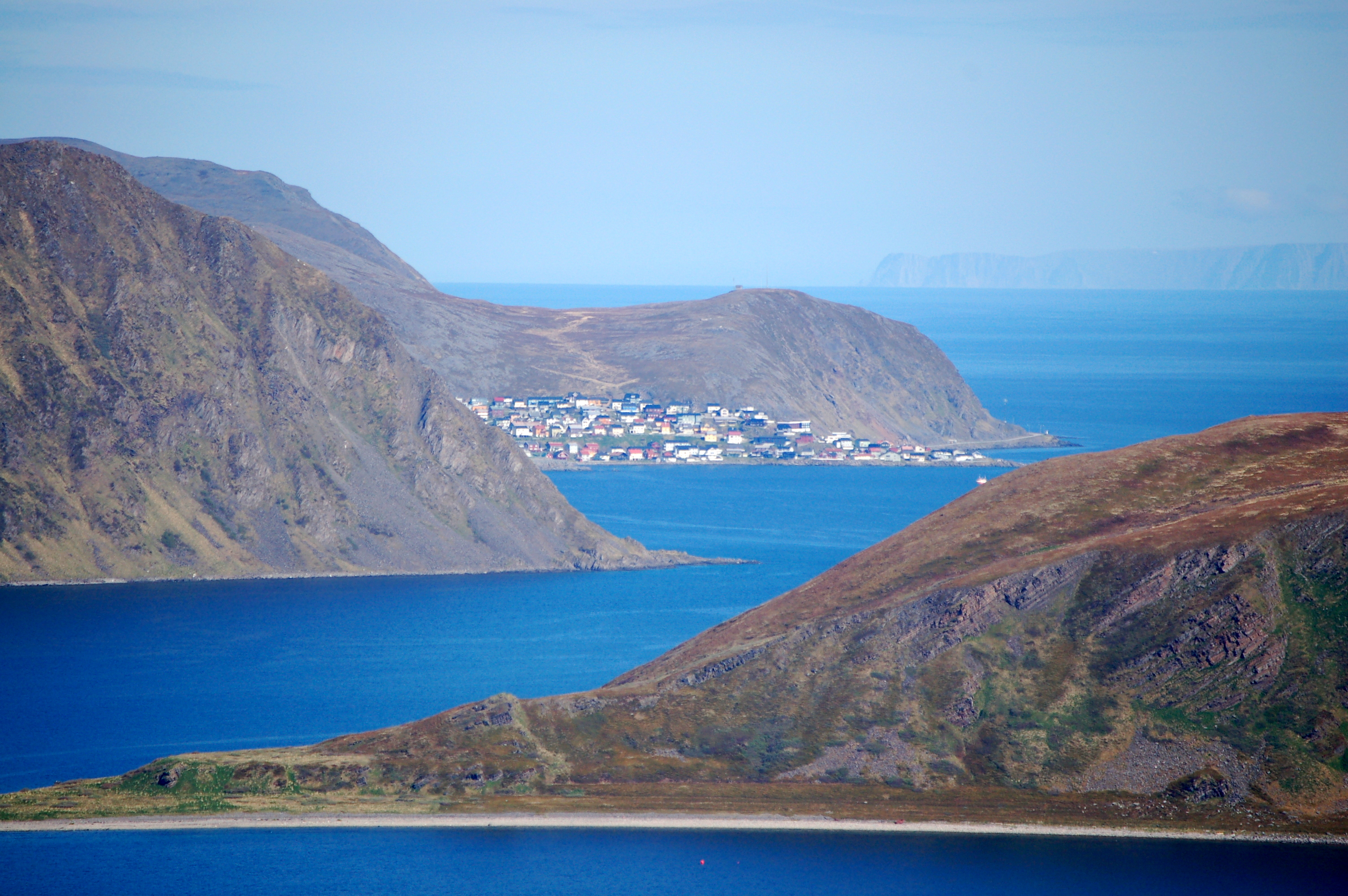 Utsikt mot Vesternova på Store Altsula (Alpesuolu), så Steinviknæringen og Honningsvåg, Nordkapp kommune. Sværholthalvøya helt i bakgrunnen. Utsiktspunkt er toppen av Bismarhallen. You are free to use this picture outside Wikipedia (see license), as long as you write: Photo: Arnstein Rønning